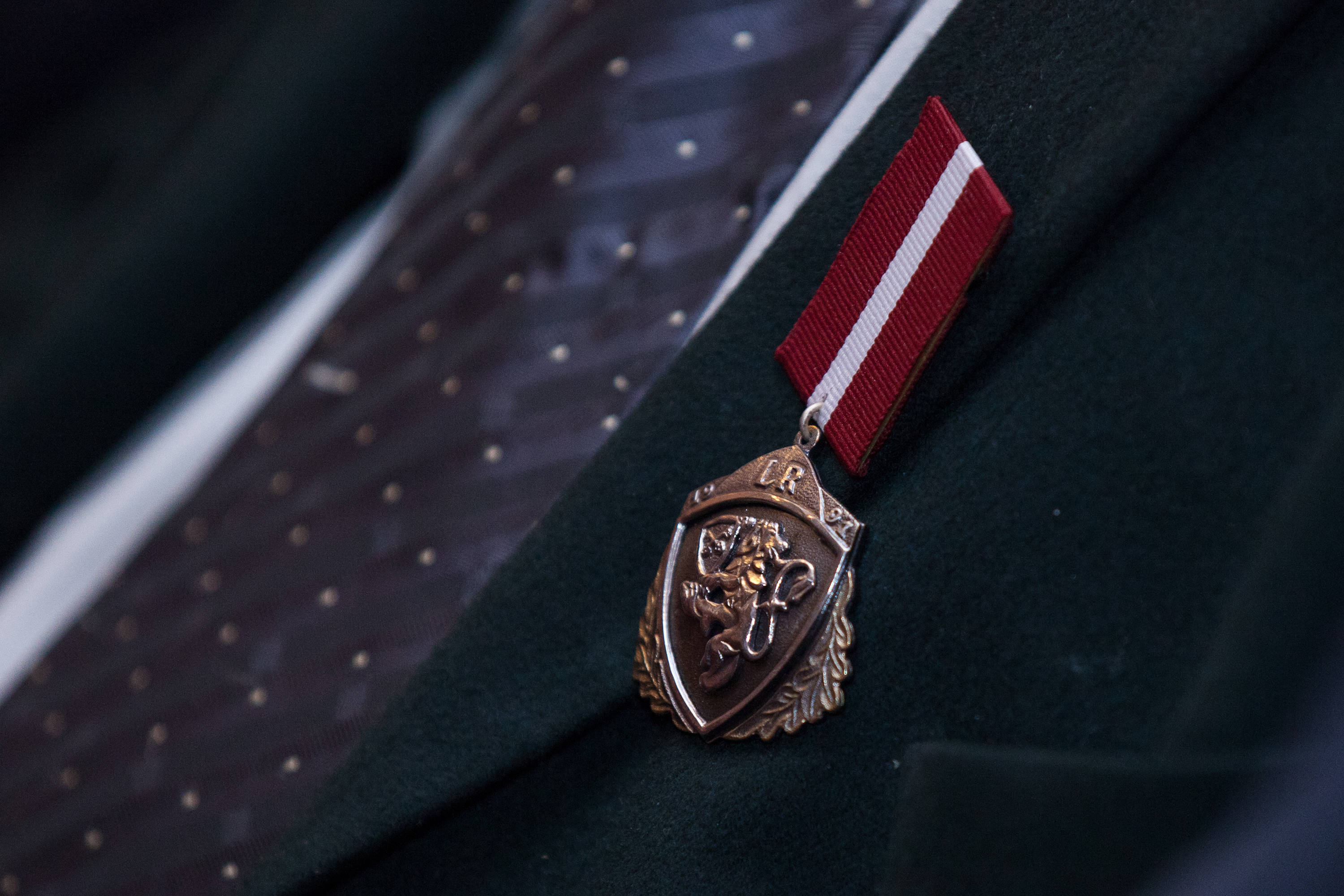 2011.gads 1.marts. 1991.gada barikāžu dalībnieka piemiņas zīmju pasniegšana Salaspilī. Foto: Saeima